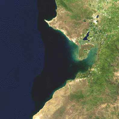 Imagen satelital del Golfo de Guayaquil.